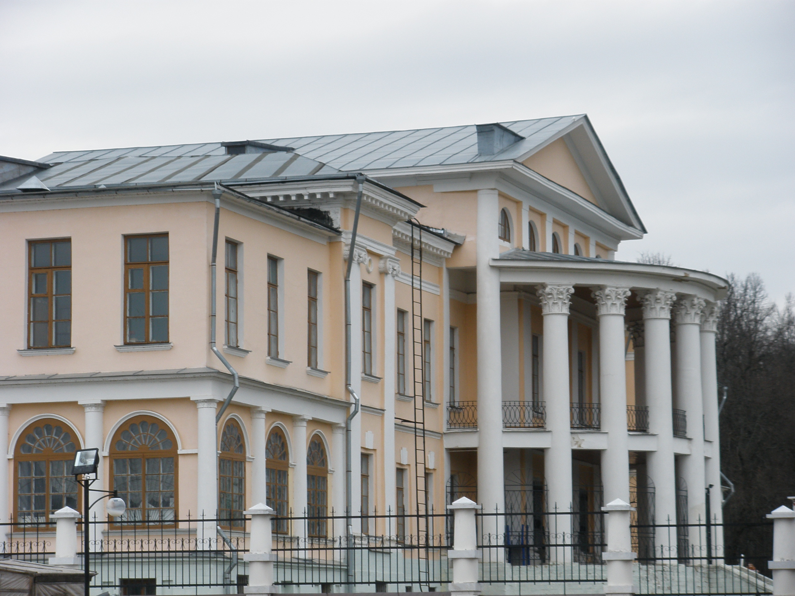 с. Дубровицы Подольский район Московская область